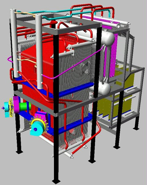 Трёхмерное изображение котла